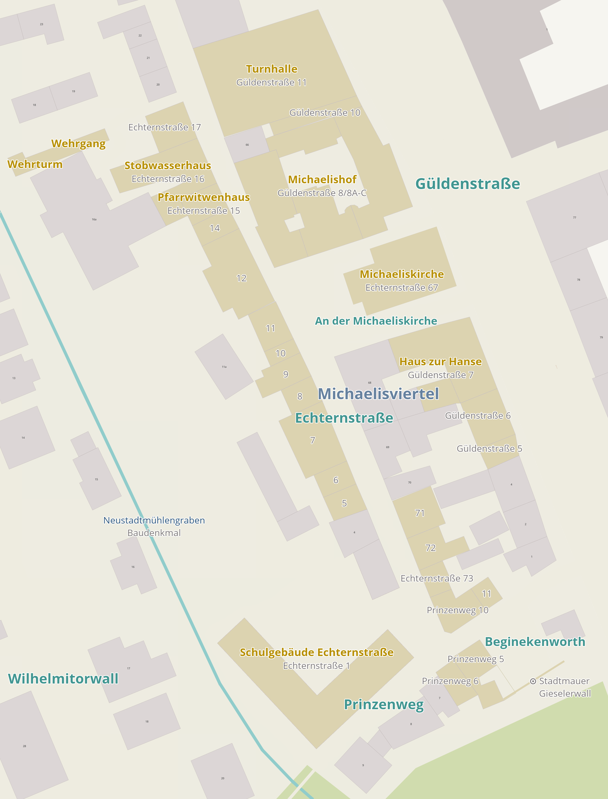 Plan des Michaelisviertels in Braunschweig. Die Kulturdenkmale sind gelblich eingezeichnet.